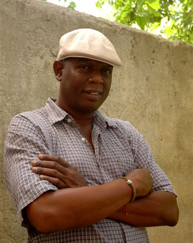 Escritor cubano Alberto Guerra Naranjo